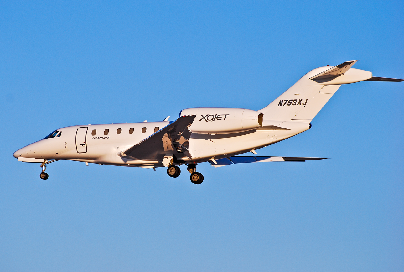 Las Vegas - McCarran International (LAS / KLAS) USA - Nevada, March 8, 2012 Photo: Tomás Del Coro